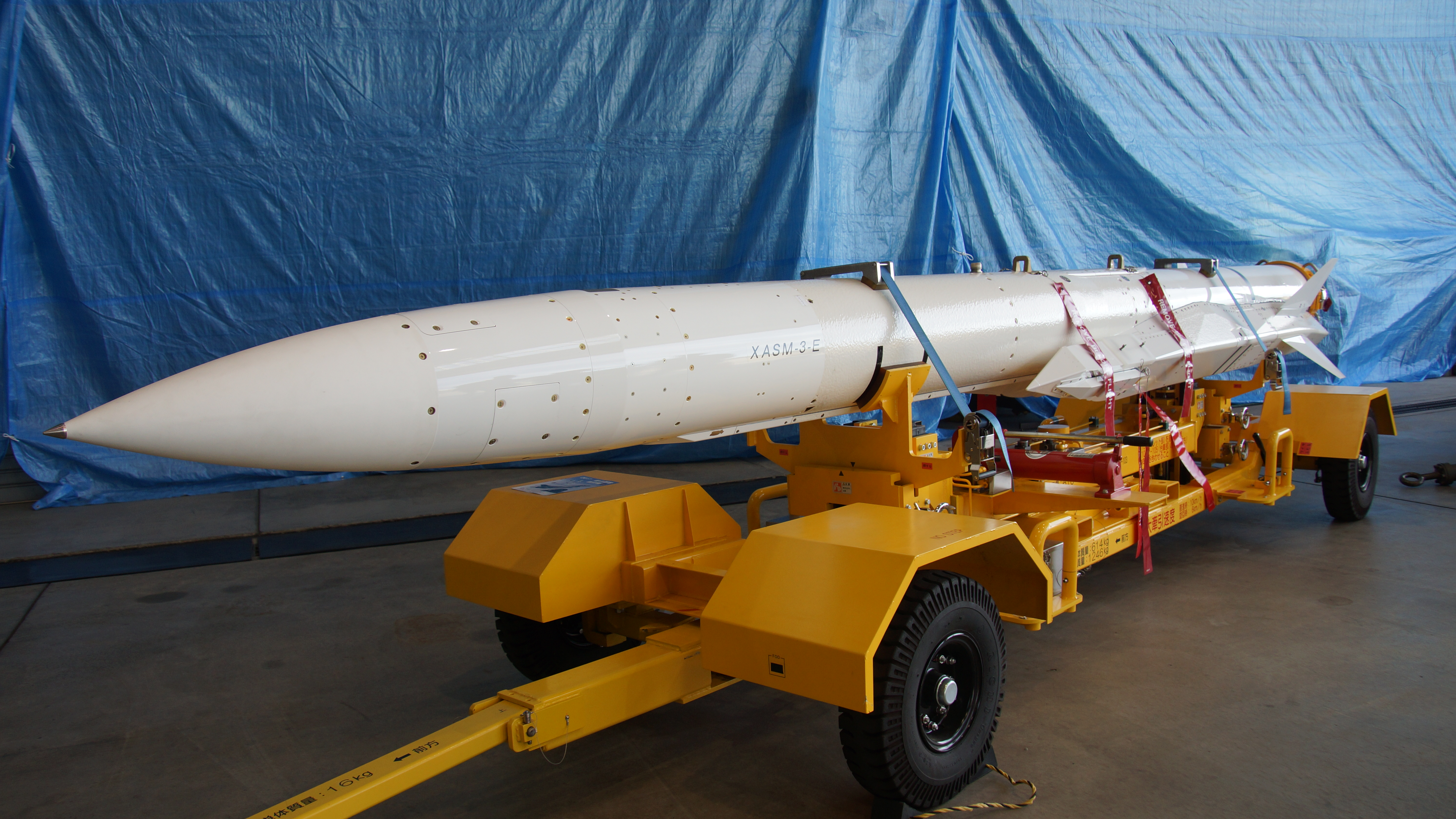 航空自衛隊 新空対艦誘導弾XASM-3（E型） 左前面。2017年11月19日 岐阜基地にて。